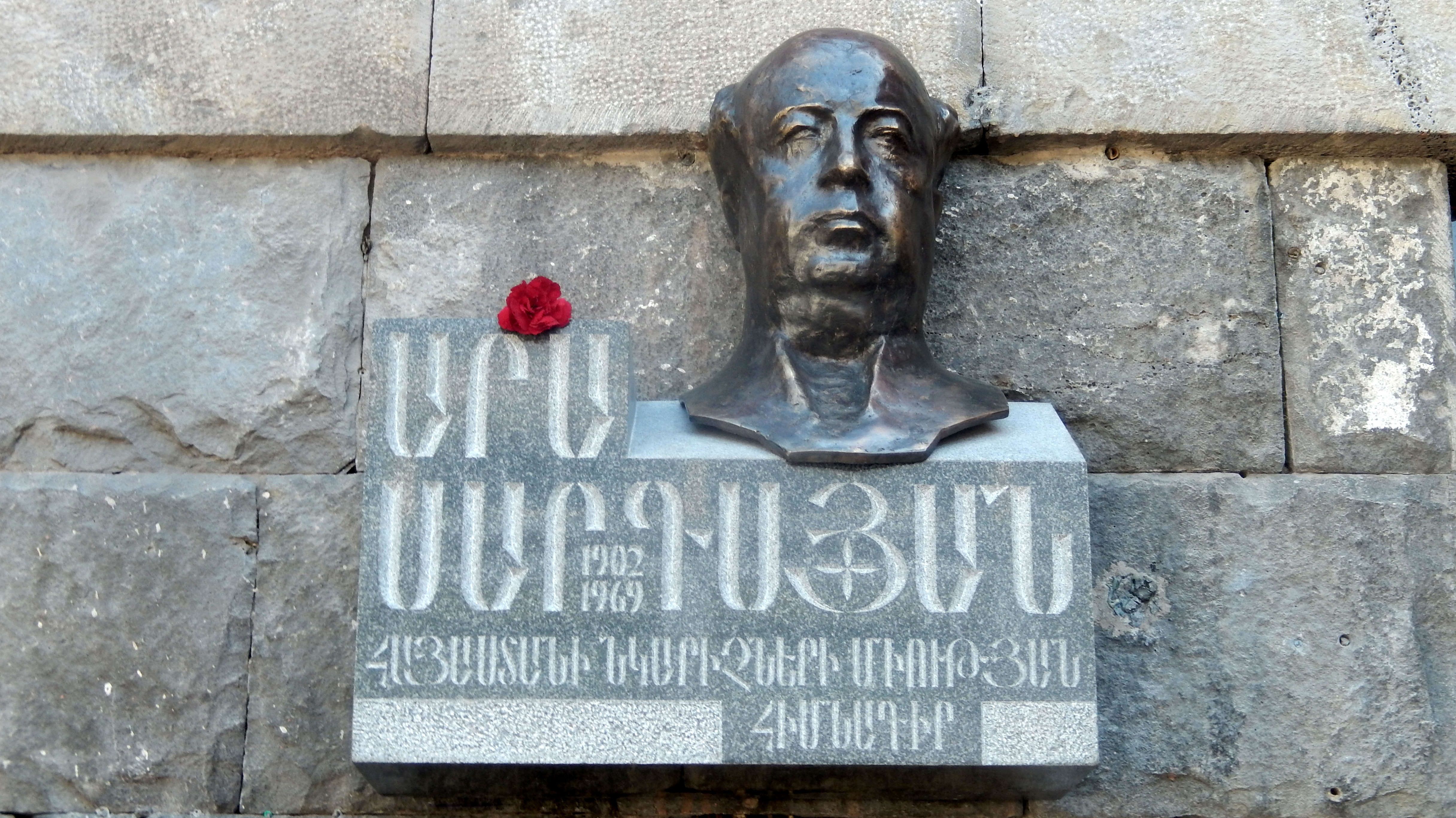 Արա Սարգսյանի դիմաքանդակը Հայաստանի նկարիչների միության շենքի մուտքի մոտ 6/178.3.4